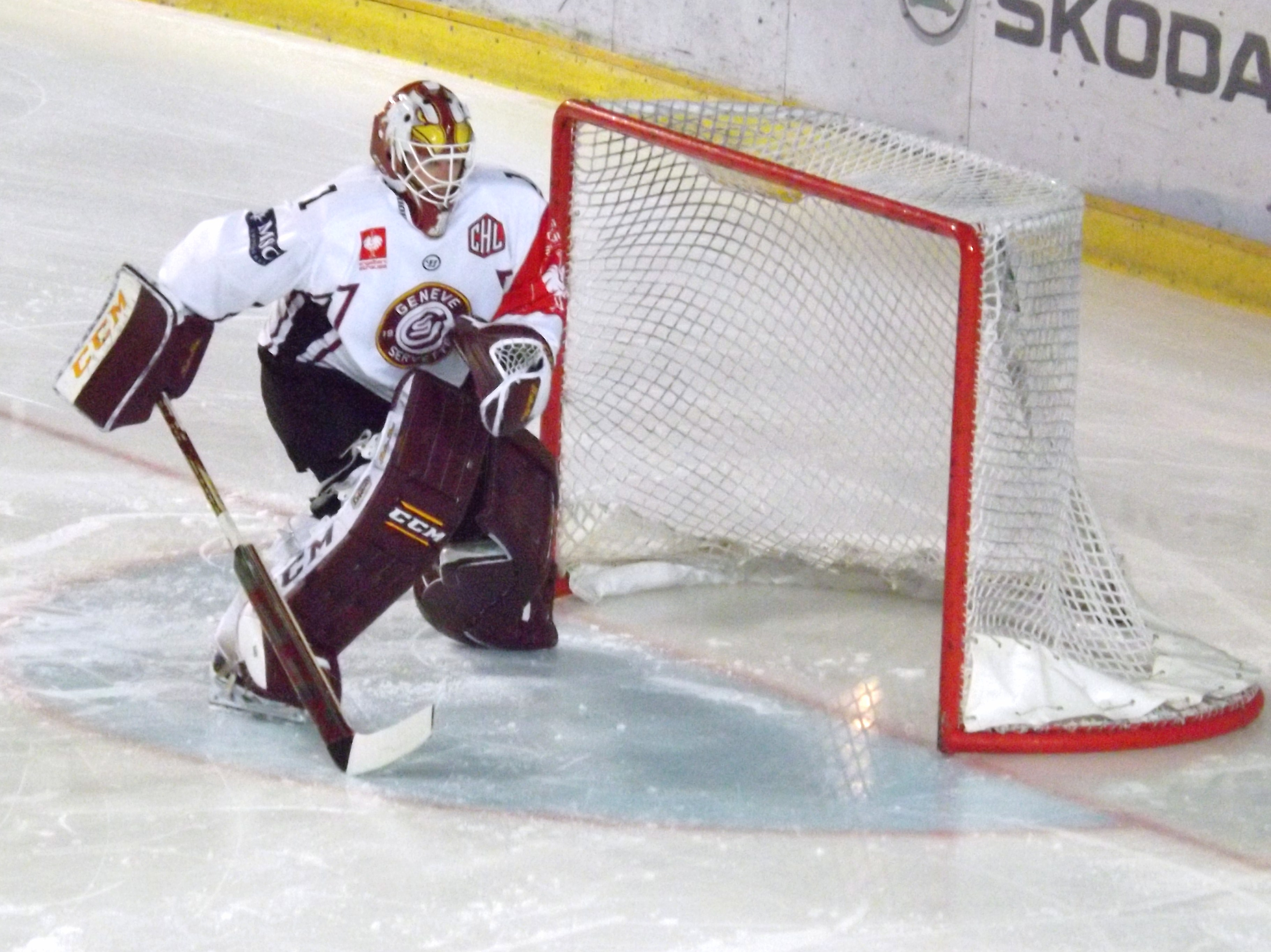 Joueur de hockey sur glace Genève-Servette, match de CHL Briançon - Genève-Servette